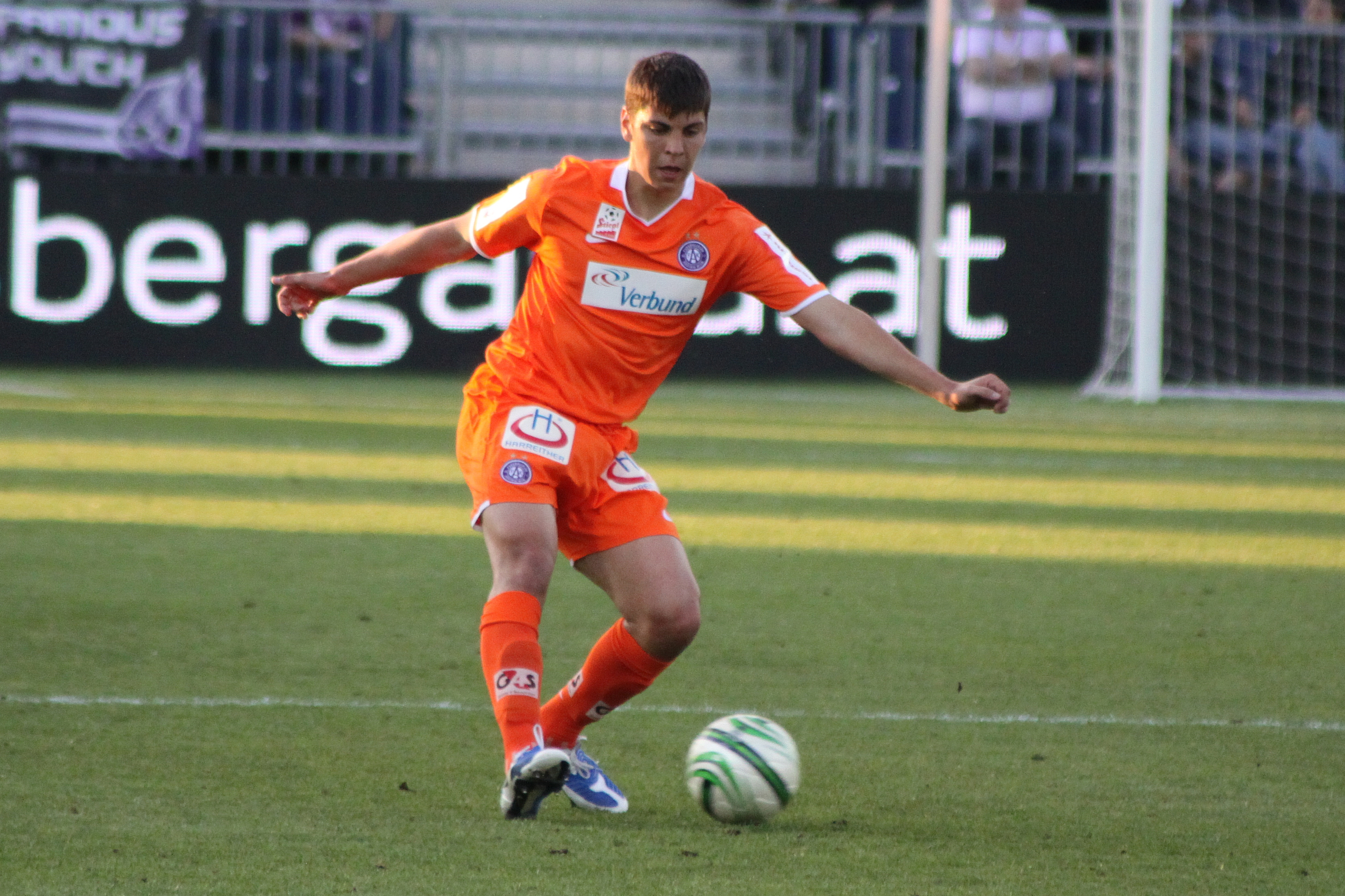 Aleksandar Dragovic im Spiel - FK Austria Wien